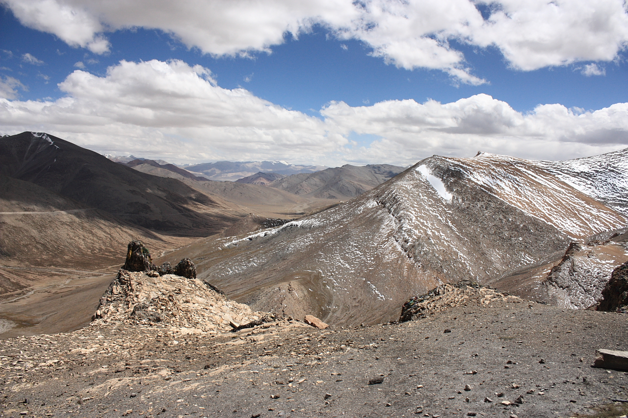 Tanglang La